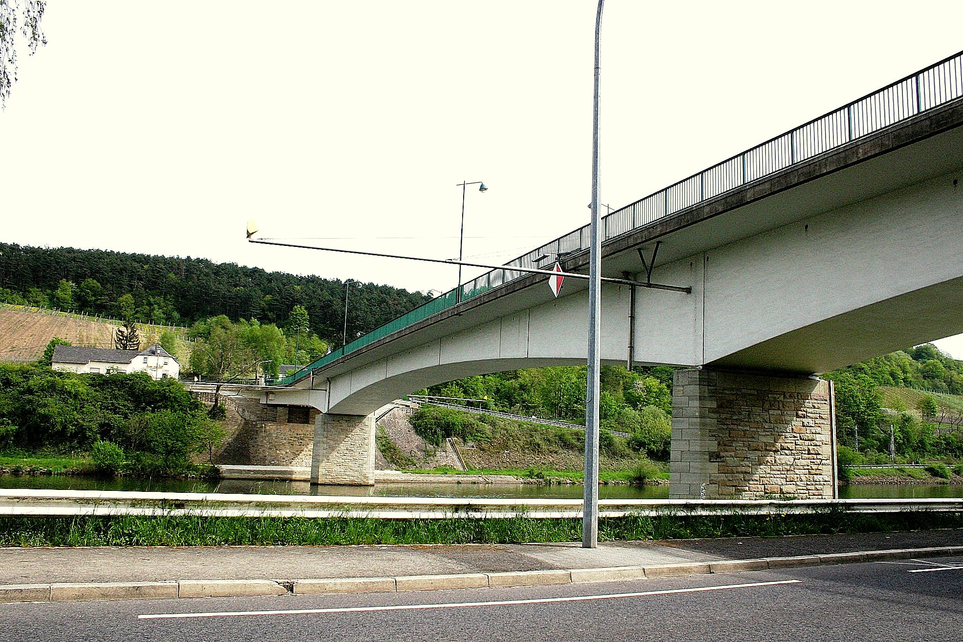 Muselbréck vun der Wuermer Säit gesinn